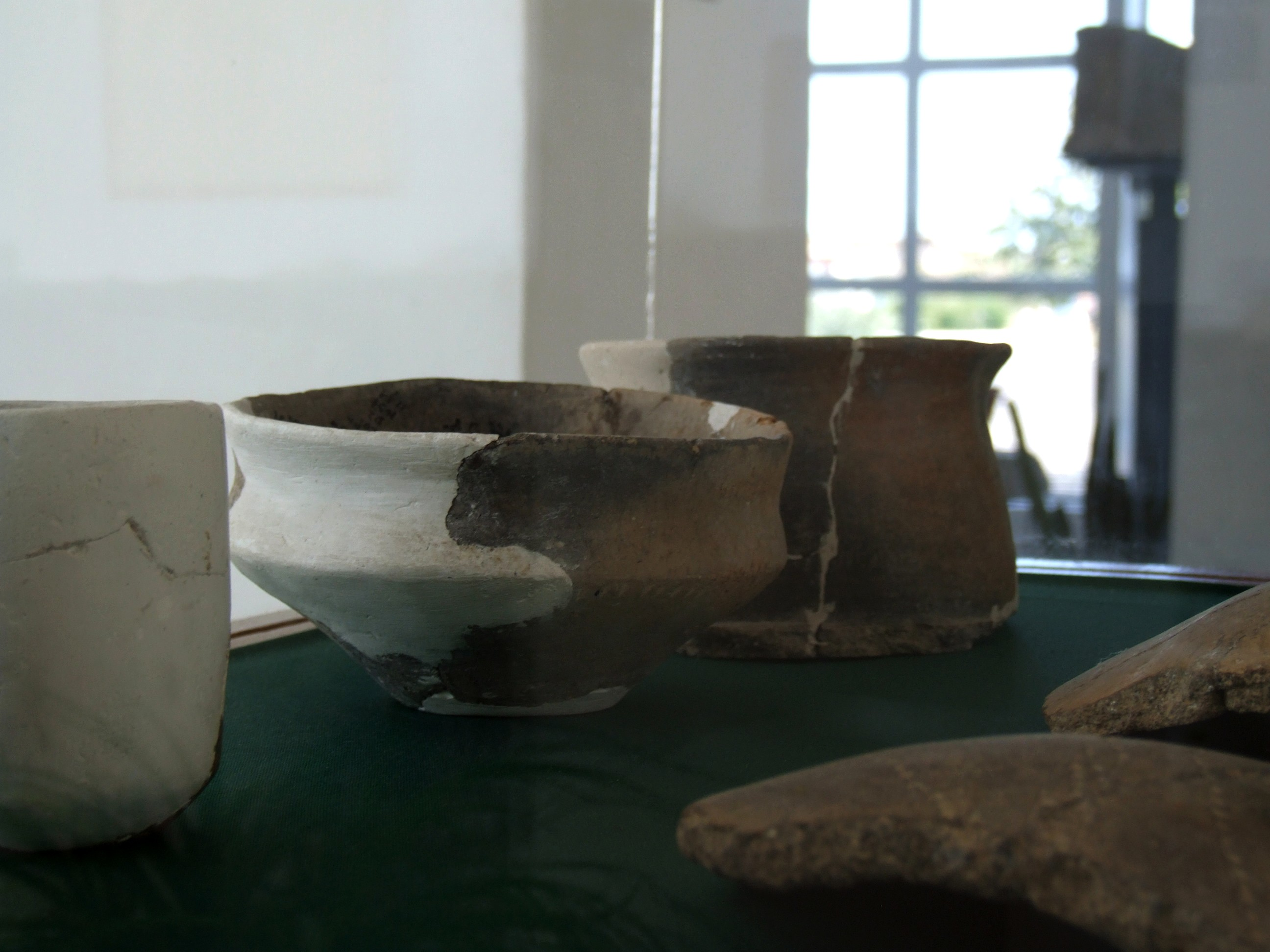 Hamangia culture, Histria Museum